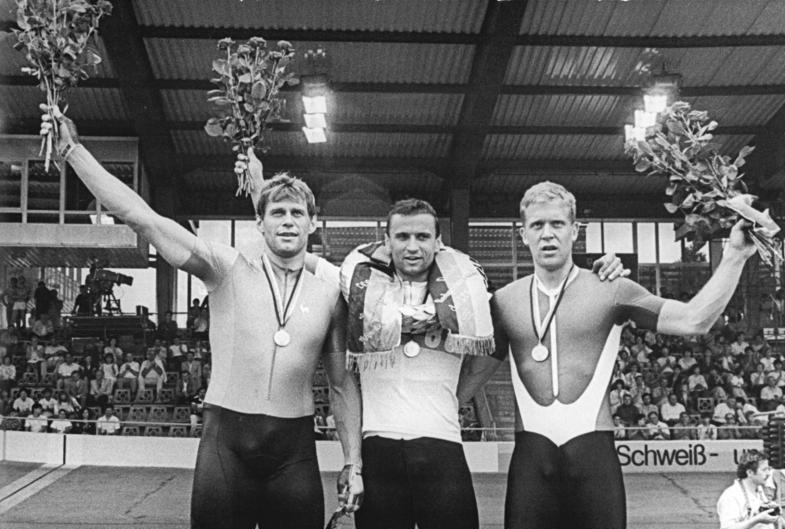 Michael Hübner, Lutz Heßlich, Bill Huck Information added by Wikimedia users.ADN-ZB Weisflog 9.7.88 Cottbus: DDR-Bahnradsport-Meisterschaften - Die Sieger in der Sprintentscheidung: Zum zehnten Mal wurde der Olympiasieger und sechsfache Weltmeister Lutz Heßlich (SC Cottbus M.) DDR-Meister, Zweiter wurde Bill Huck (SC Dynamo Berlin. r.) und dritter der Karl-Marx-Städter Michael Hübner (l.)